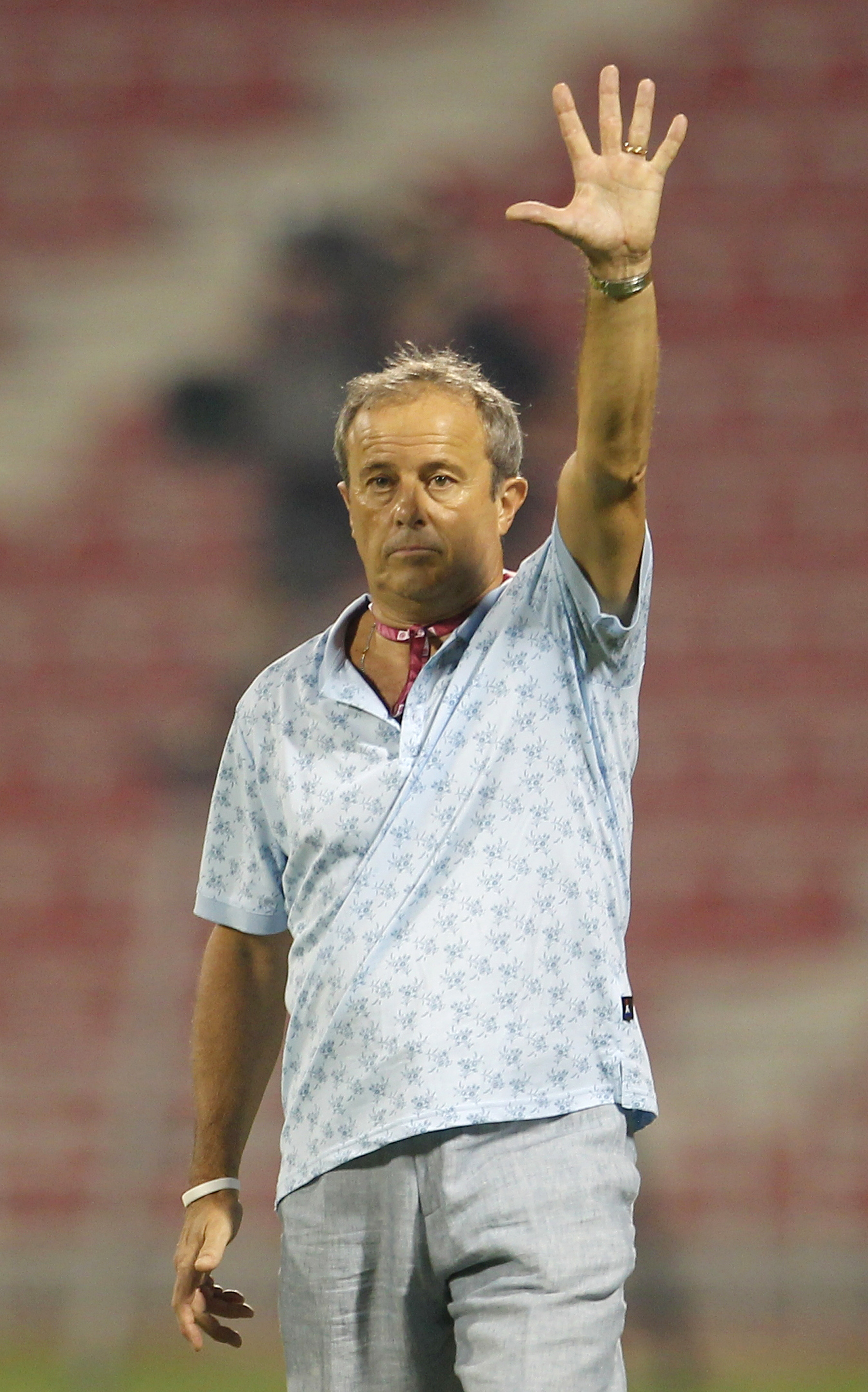 Pierre Lechantre pendant la Qatar Stars League.